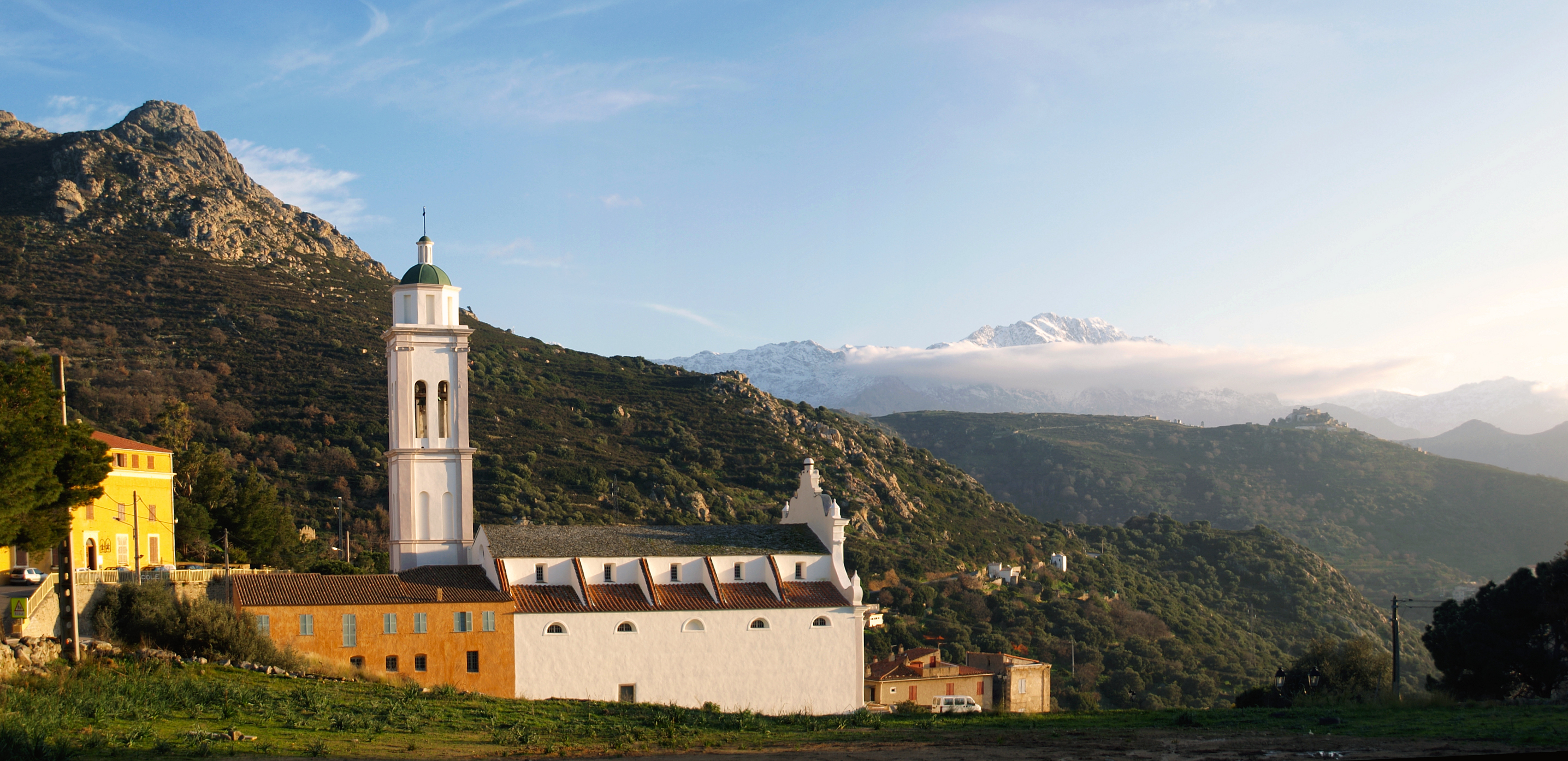 Corbara - L'école, l'église-collégiale, le Monte Grosso, Sant'Antonino